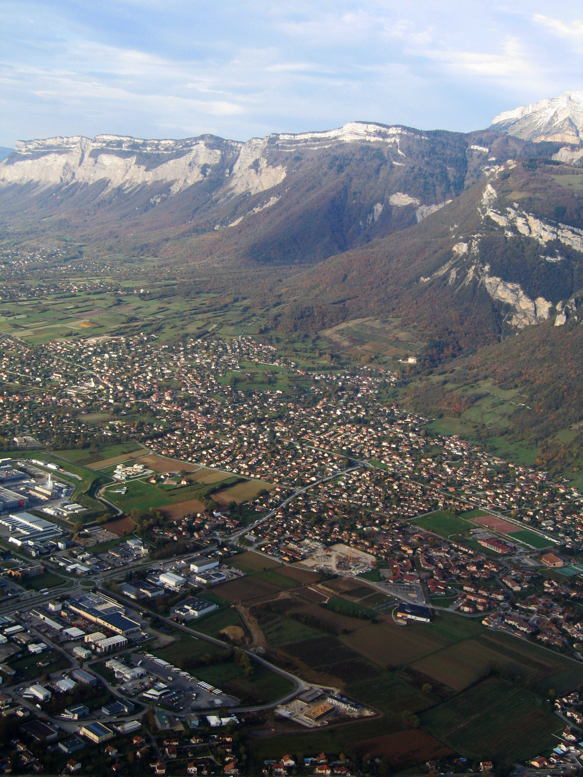 Photo aérienne de Crolles, Isère, prise le 31 octobre 2005